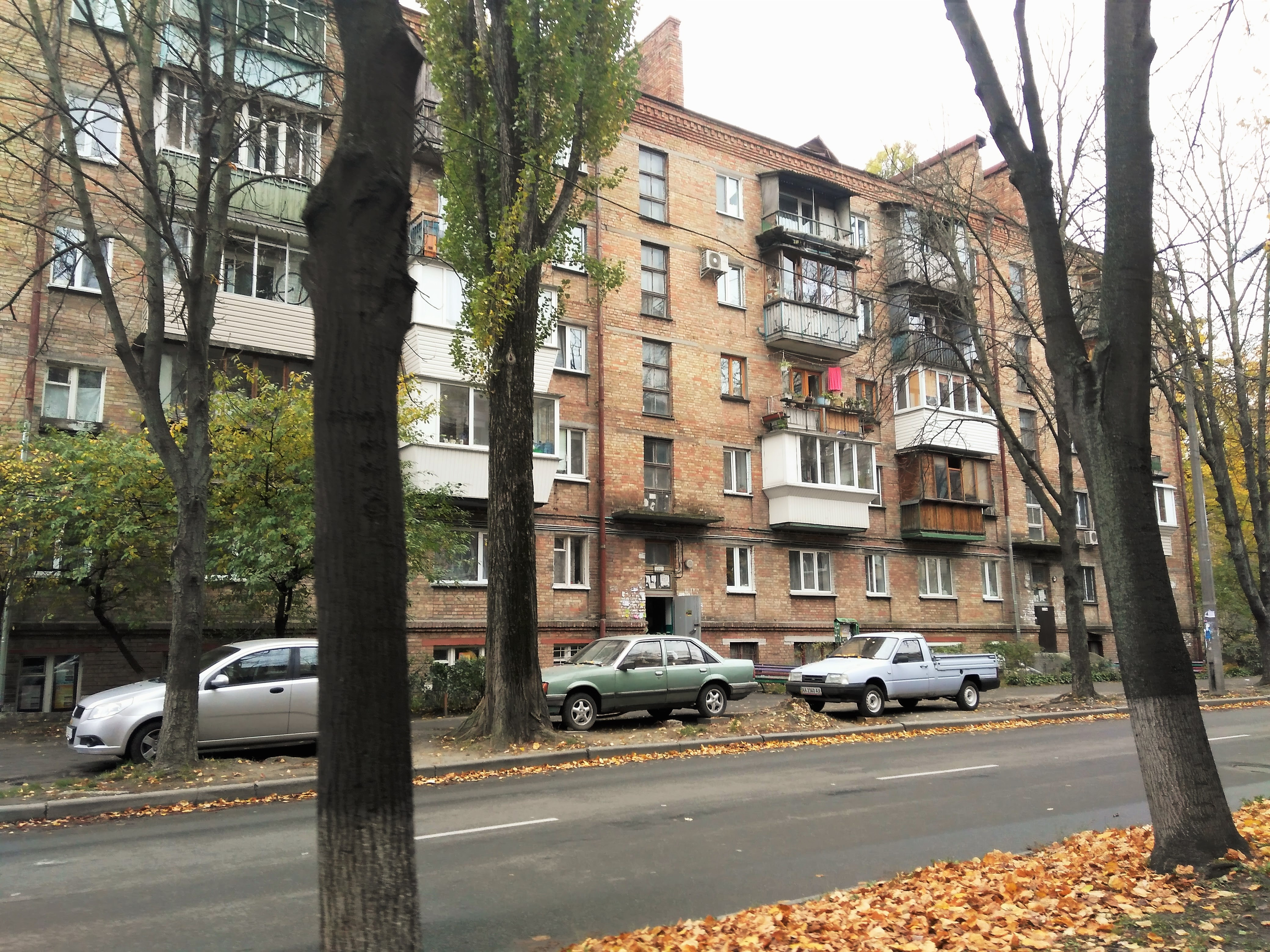 Цегляна хрущовка, вул. Естонська, 1/5, місто Київ, Україна